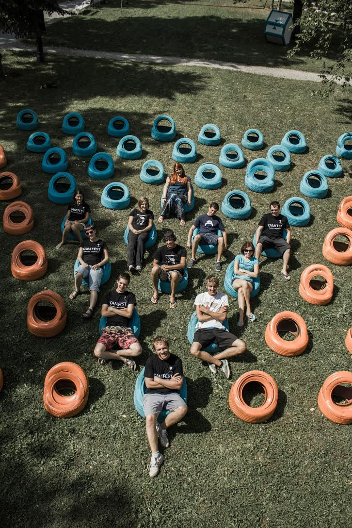 Primer t.i. alternativne organizacije arhitekturnega dela, skupina Štajn